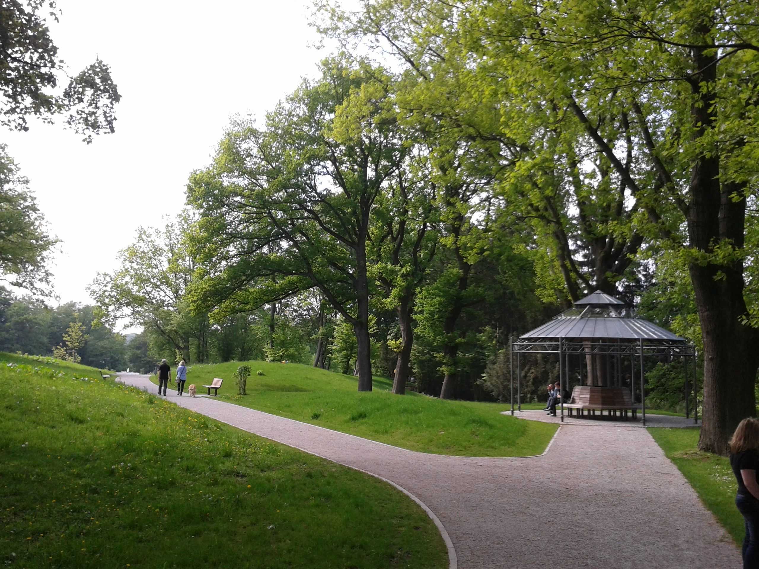 Park auf dem Johannisberg Bielefeld.